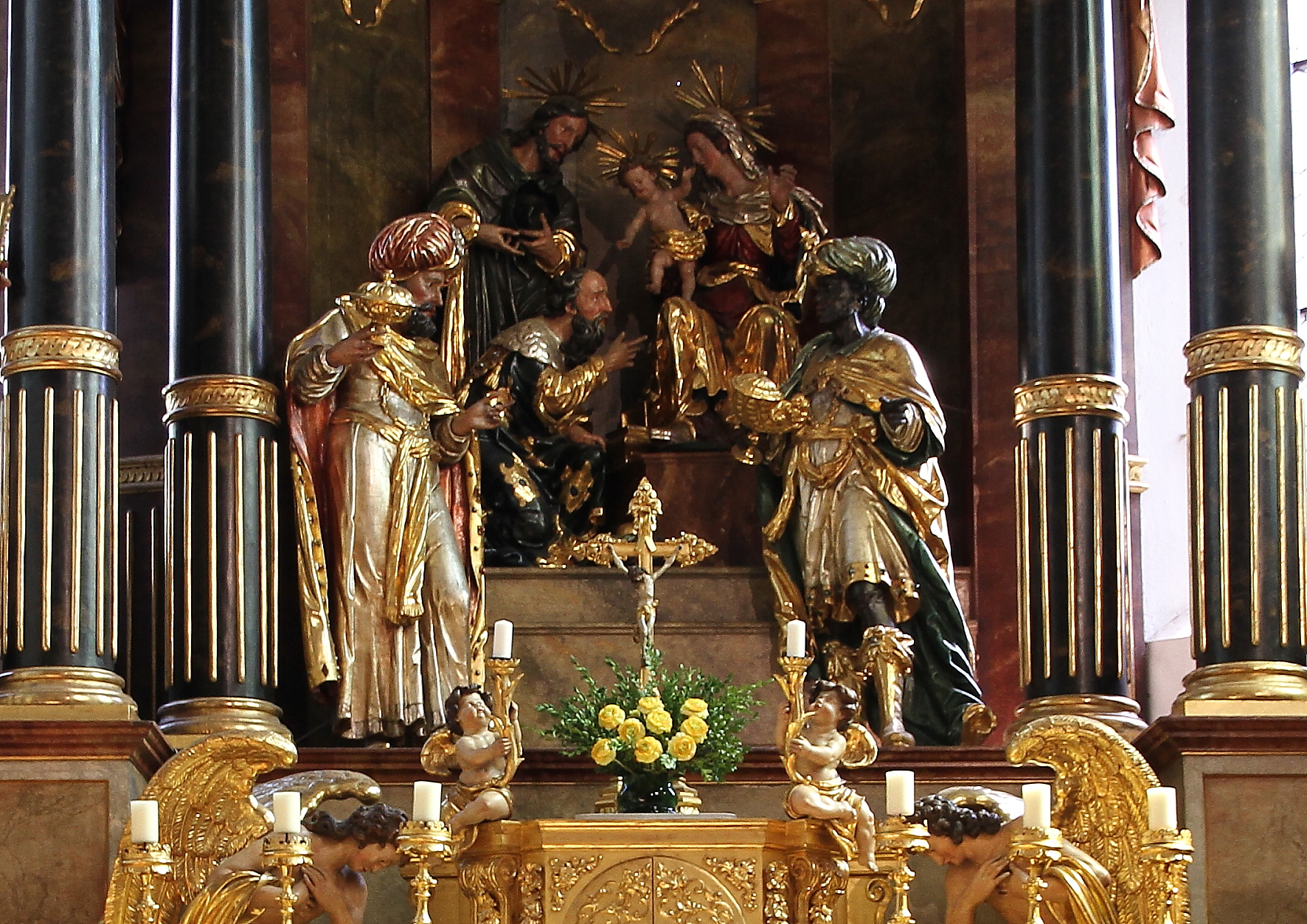 Die lebensgroße Gruppe "Anbetung der hl. drei Könige", ein Werk von Thomas Schwanthaler und Teil des Hochaltars der Stadtpfarrkirche von Gmunden in Oberösterreich.